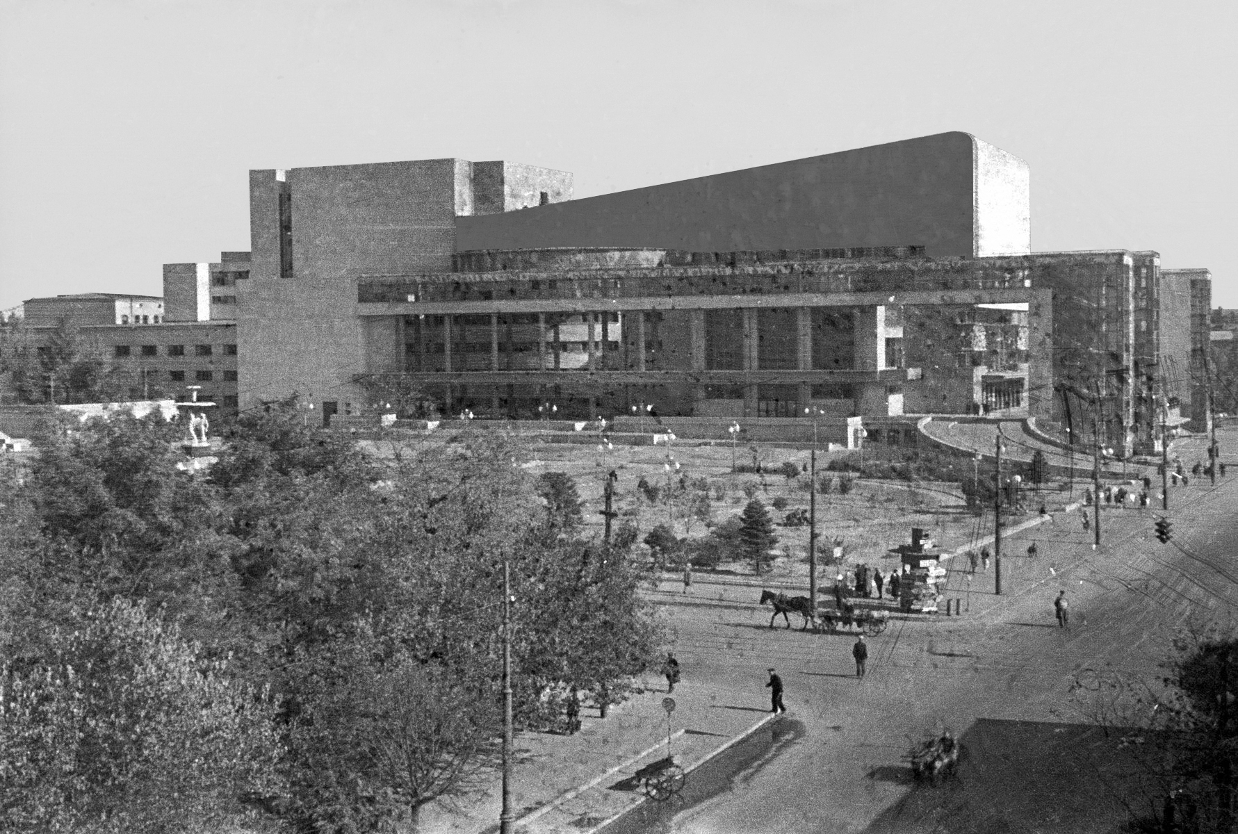 Ростов на Дону Вид на театр им Горького, 1942